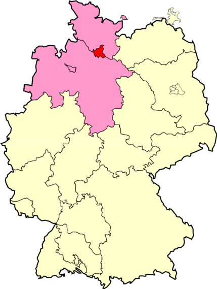 Logo de la HFV au sein de la NFV Catégorie:Football en Allemagne